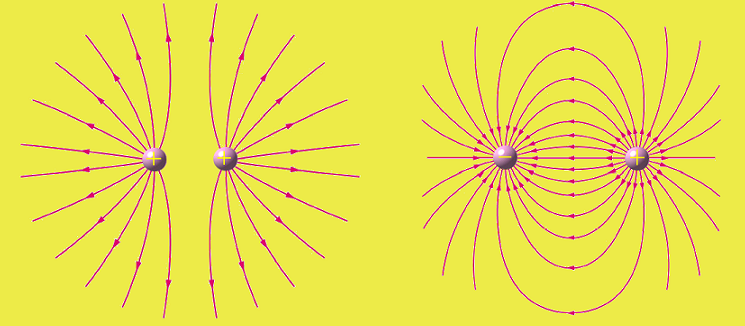 Representación de campo eléctrico producido por dos cargas